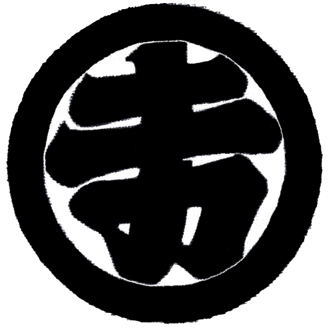 岡部家オリジナルの家紋